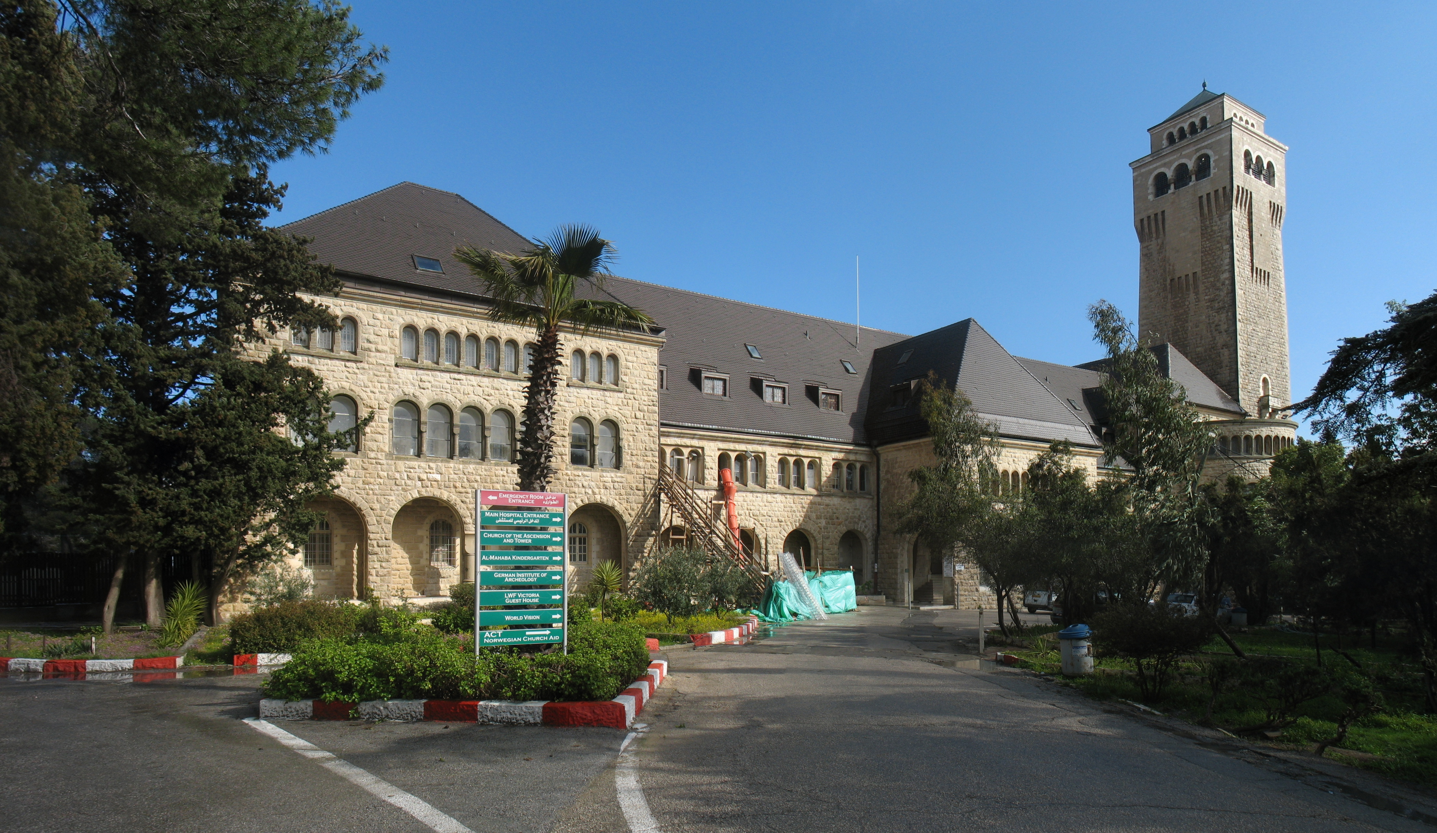 Himmelfahrtkirche auf dem Ölberg in Jerusalem.